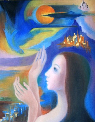 By Magdaléna Štrompachová opis: Modrý vták